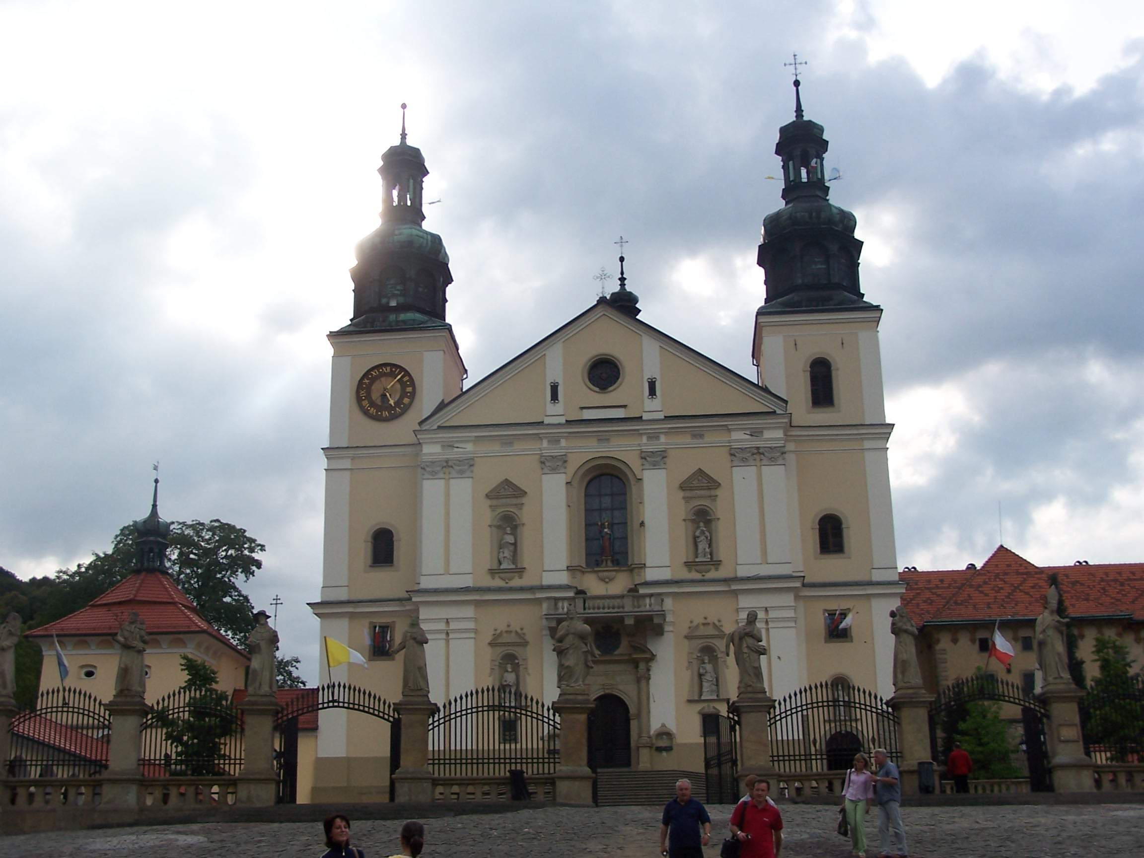 Photo by Piotrus. Monastery in Kalwaria Zebrzydowska.